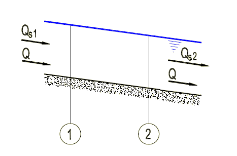 Grafico para explicar la erosión general en un tramo recto de un cauce de un río